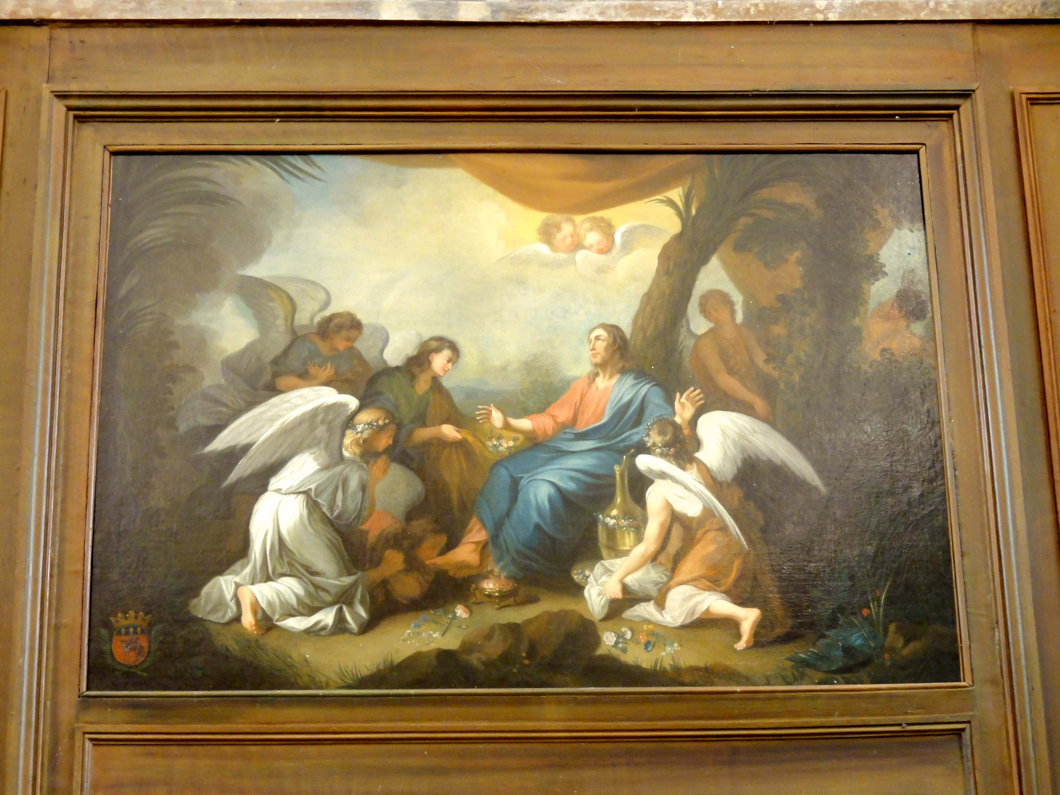 Retable du maître-autel, tableau - Le Christ au désert servi par les anges, par Liébault, 1736. Armes du prieuré Saint-Martin des Champs.